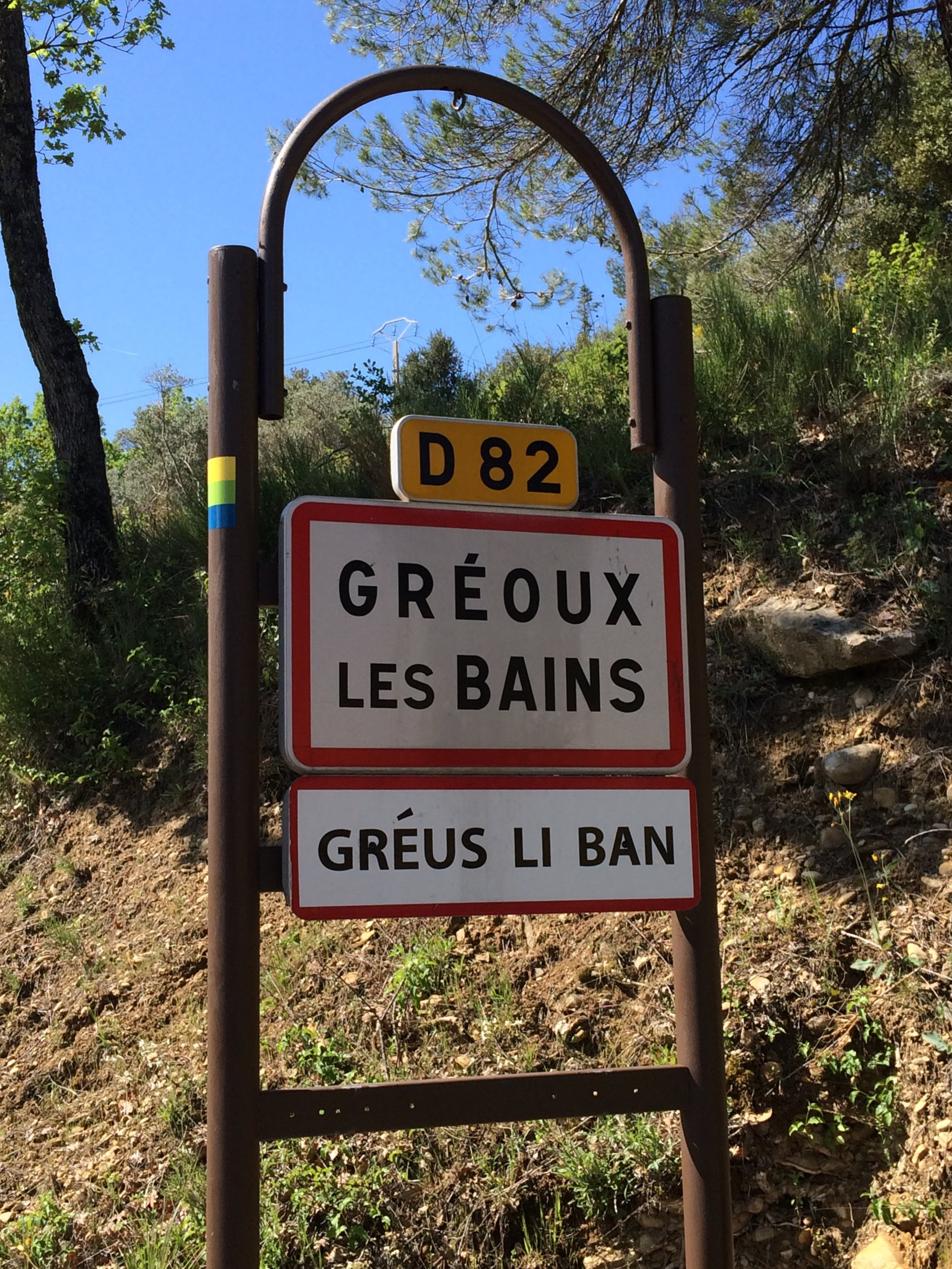 Panèl d'intrada de Grèus.